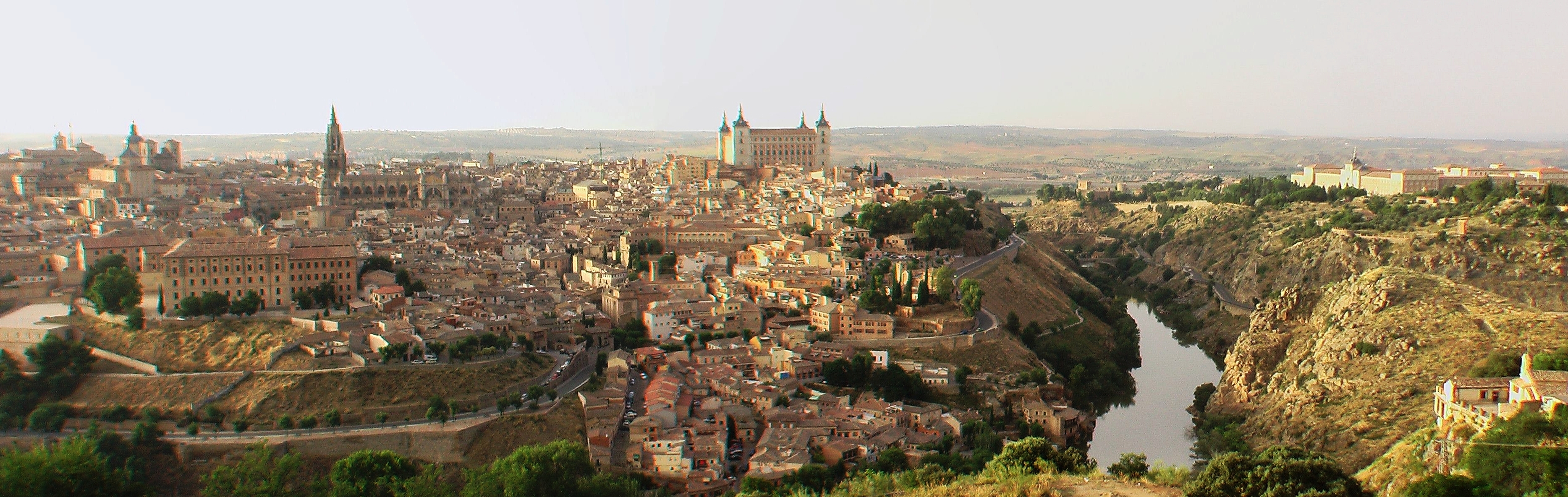 Toledo Panorama-Ansicht